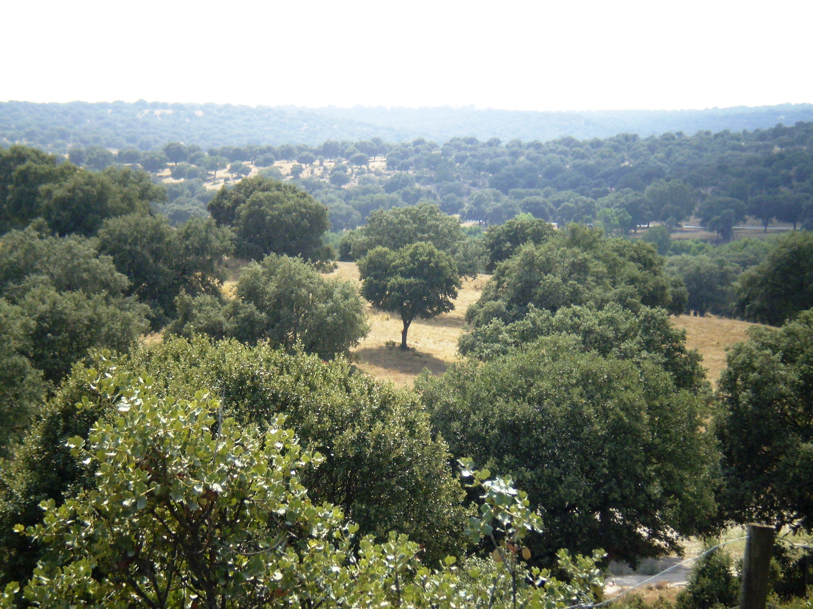 Soto de Viñuelas. Madrid, Spain